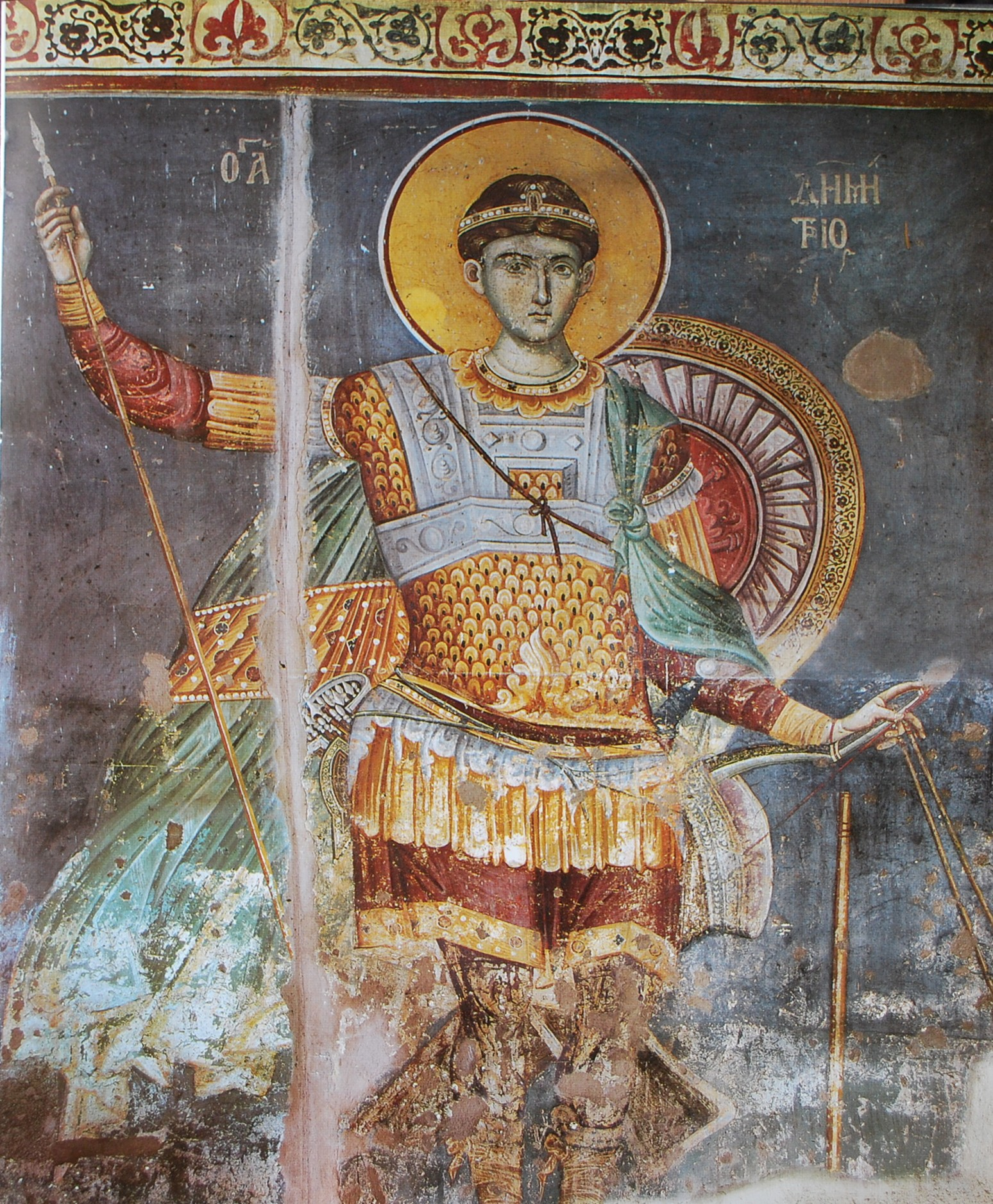 Фреска «Димитрий Солунский» в Протате